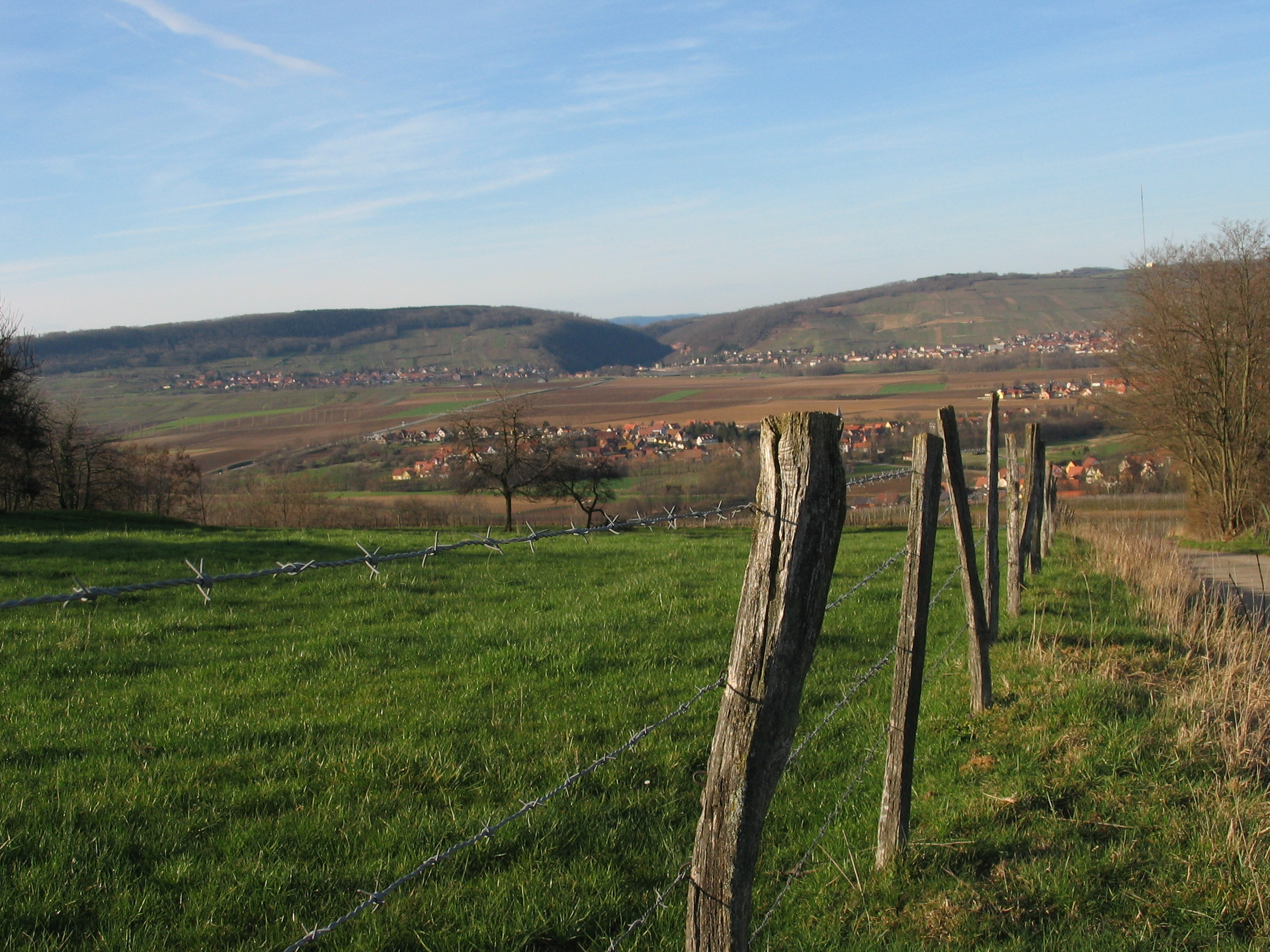 Vue du Kronthal depuis le Scharrach dans le Bas-Rhin. Au premier plan, le village d'Odratzheim, au second plan les communes de Wangen (à gauche) et Marlenheim (à droite). La colline de gauche est le Wangenberg ; celle de droite le Marlenberg